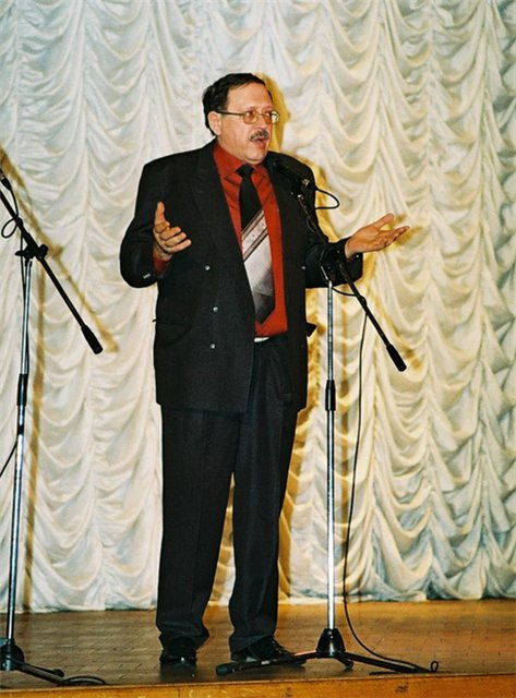 Yury Muhin (Мухин, Юрий Игнатьевич) in 2009